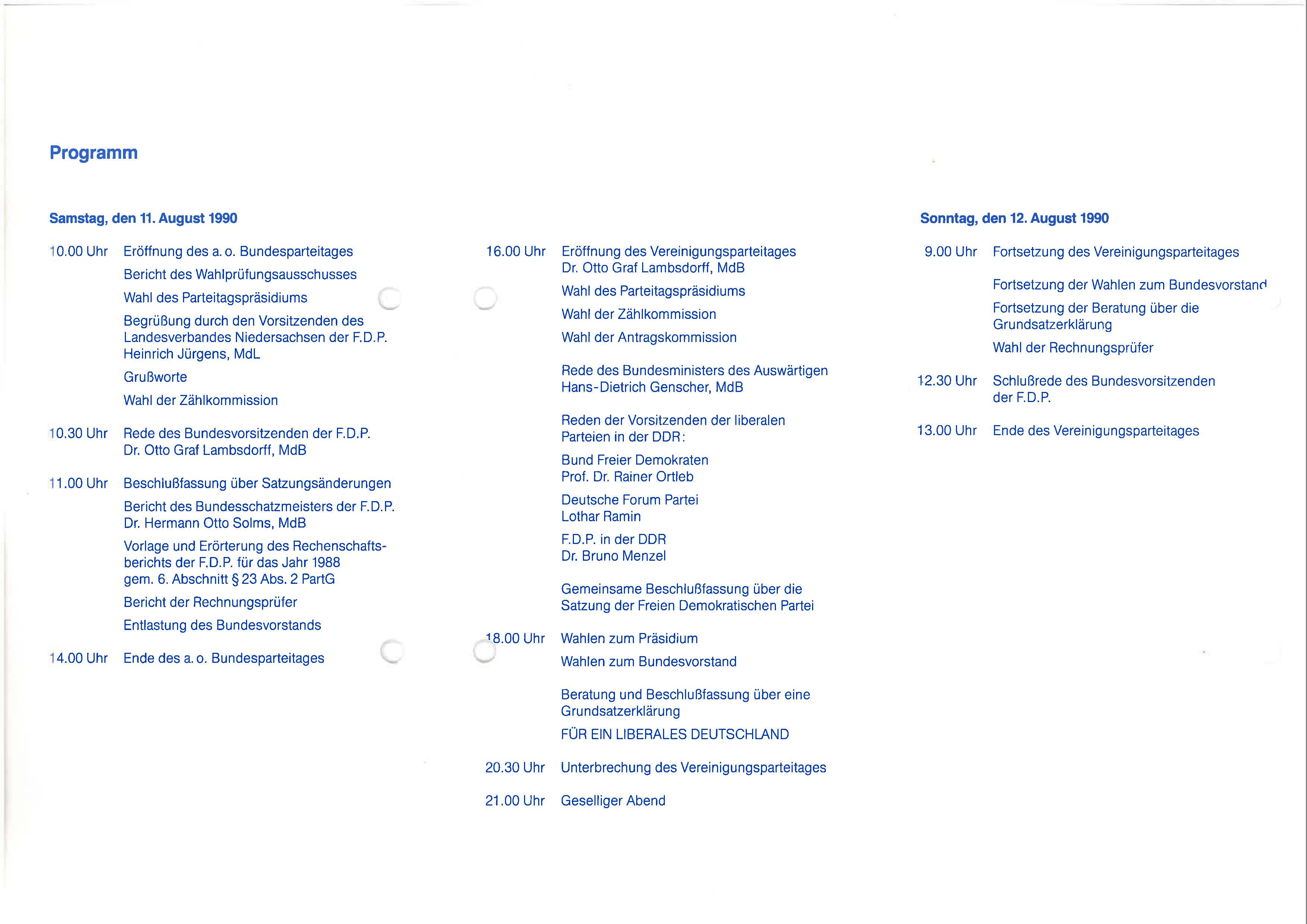 Einladung zum Vereinigungspartei 1990